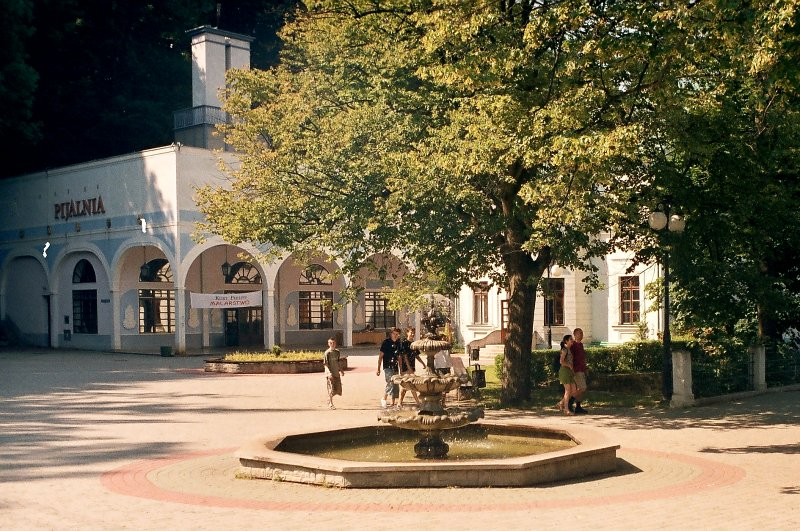 W tle widać pijalnię wód w Iwoniczu Zdroju